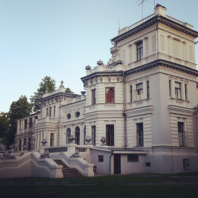 Усадьба